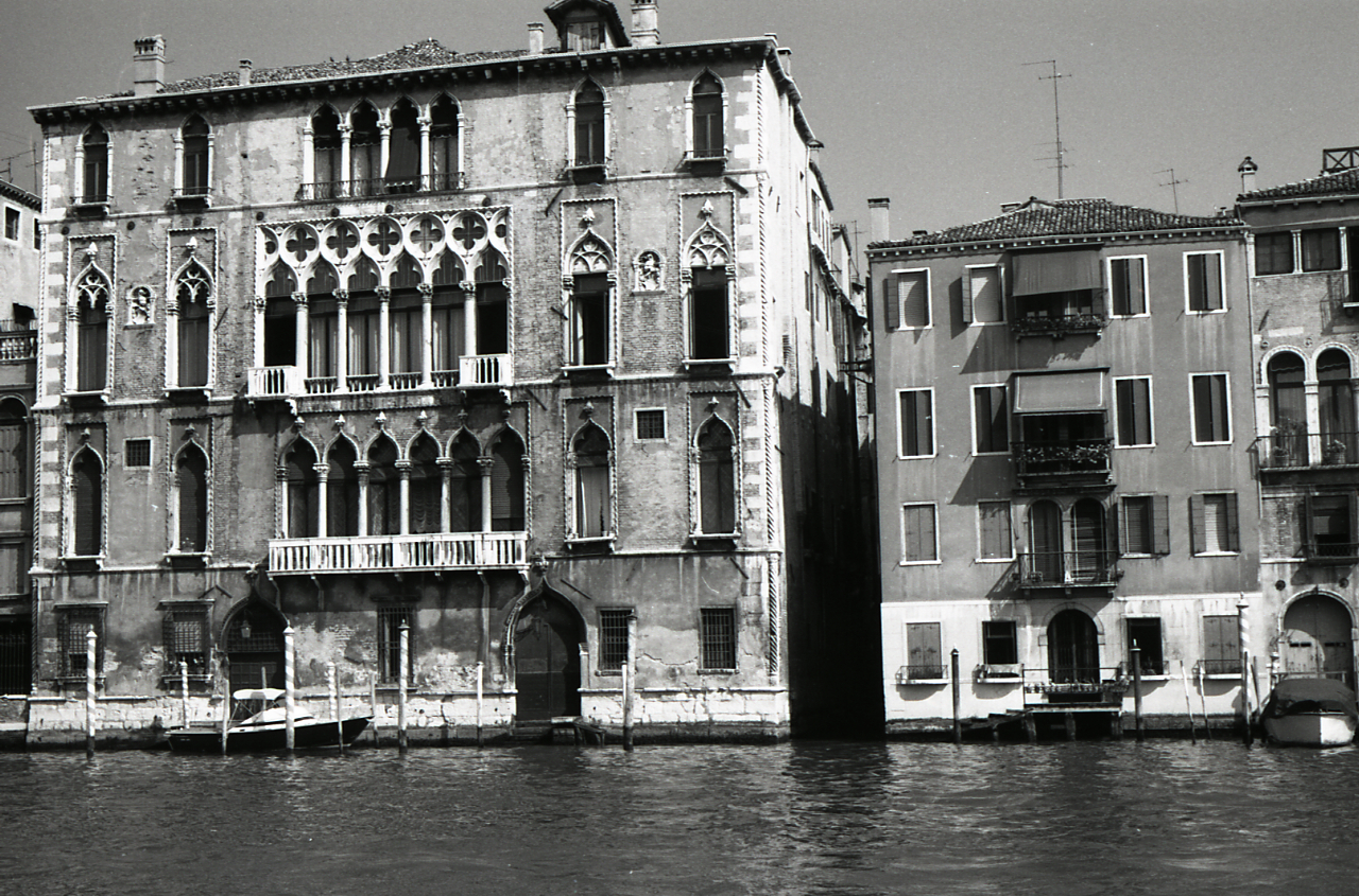 Serie fotografica : Venezia, 1969 / Paolo Monti. - Strisce: 7, Fotogrammi complessivi: 36 : Negativo b/n, gelatina bromuro d'argento/ pellicola ; 35 mm. - ((I fotogrammi hanno una doppia numerazione. . - Sul portanegativi: Nikon Agfa 21. - All'interno del portanegativi Monti specifica alcuni soggetti. - Fonte: Agenda di Paolo Monti: Monti - Agenda 1969 (1969), presso Archivio Paolo Monti